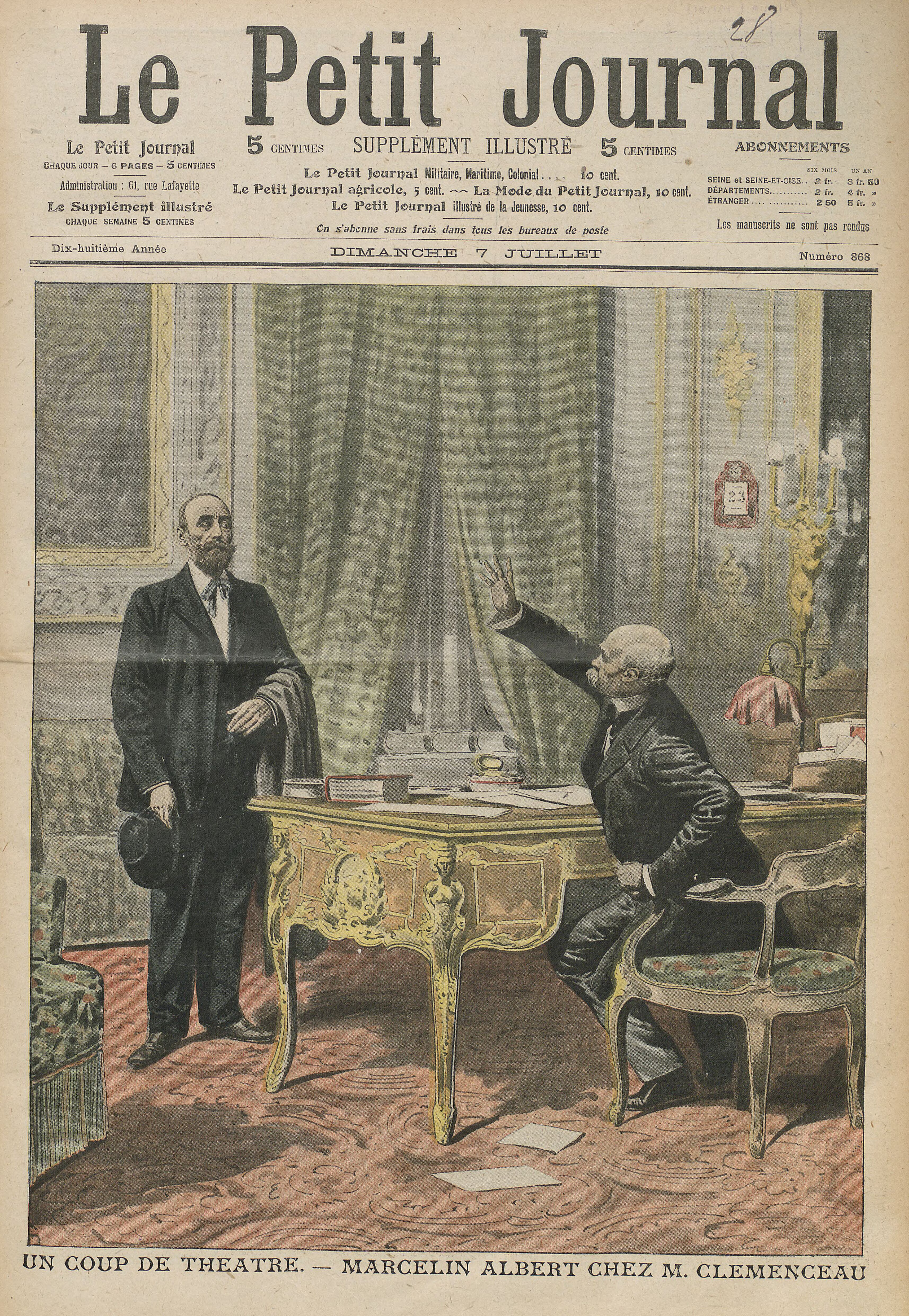 Marcellin Albert face à Clémenceau